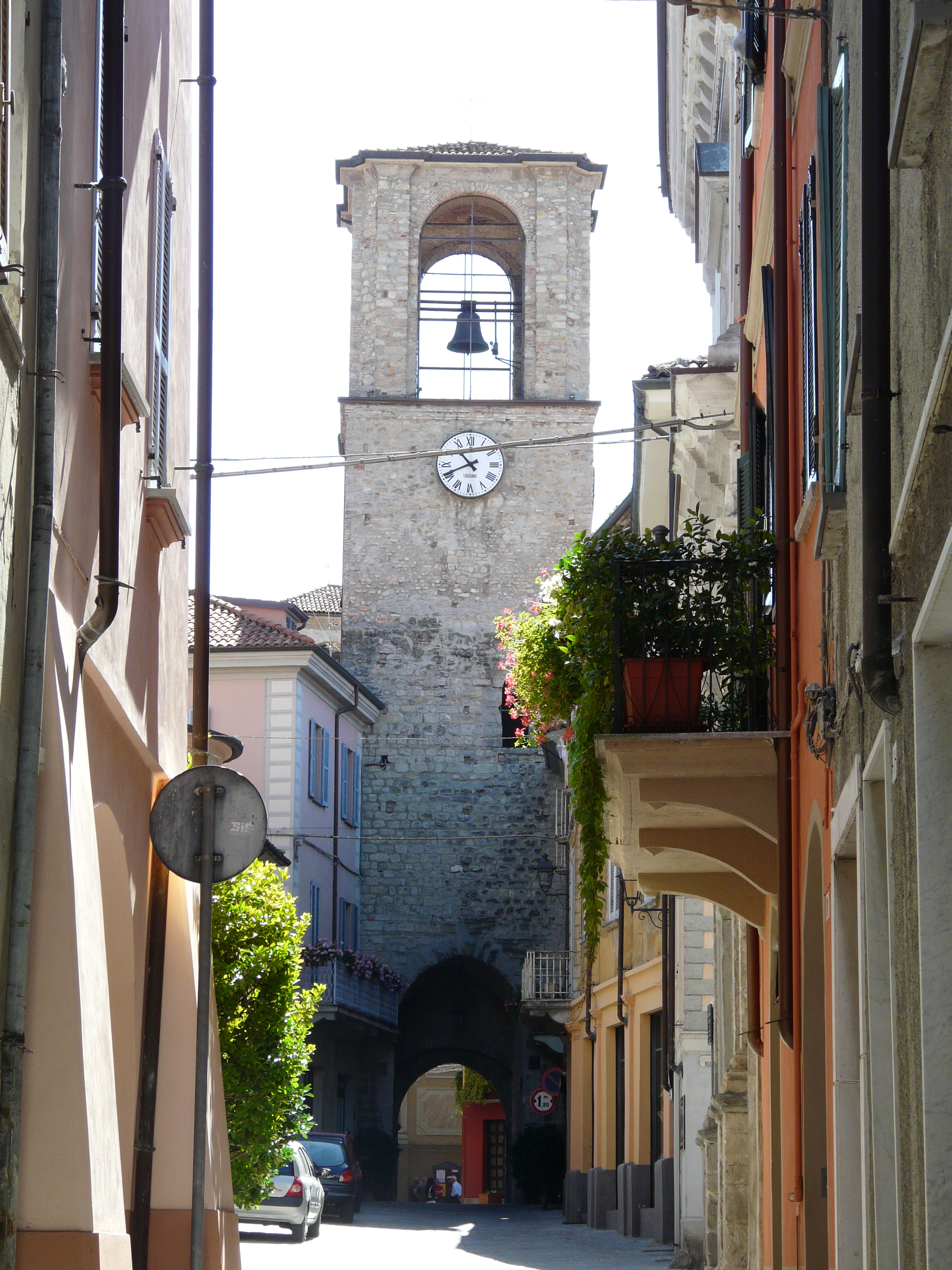 Torre di Porta Soprana, Varzi, Lombardia, Italia